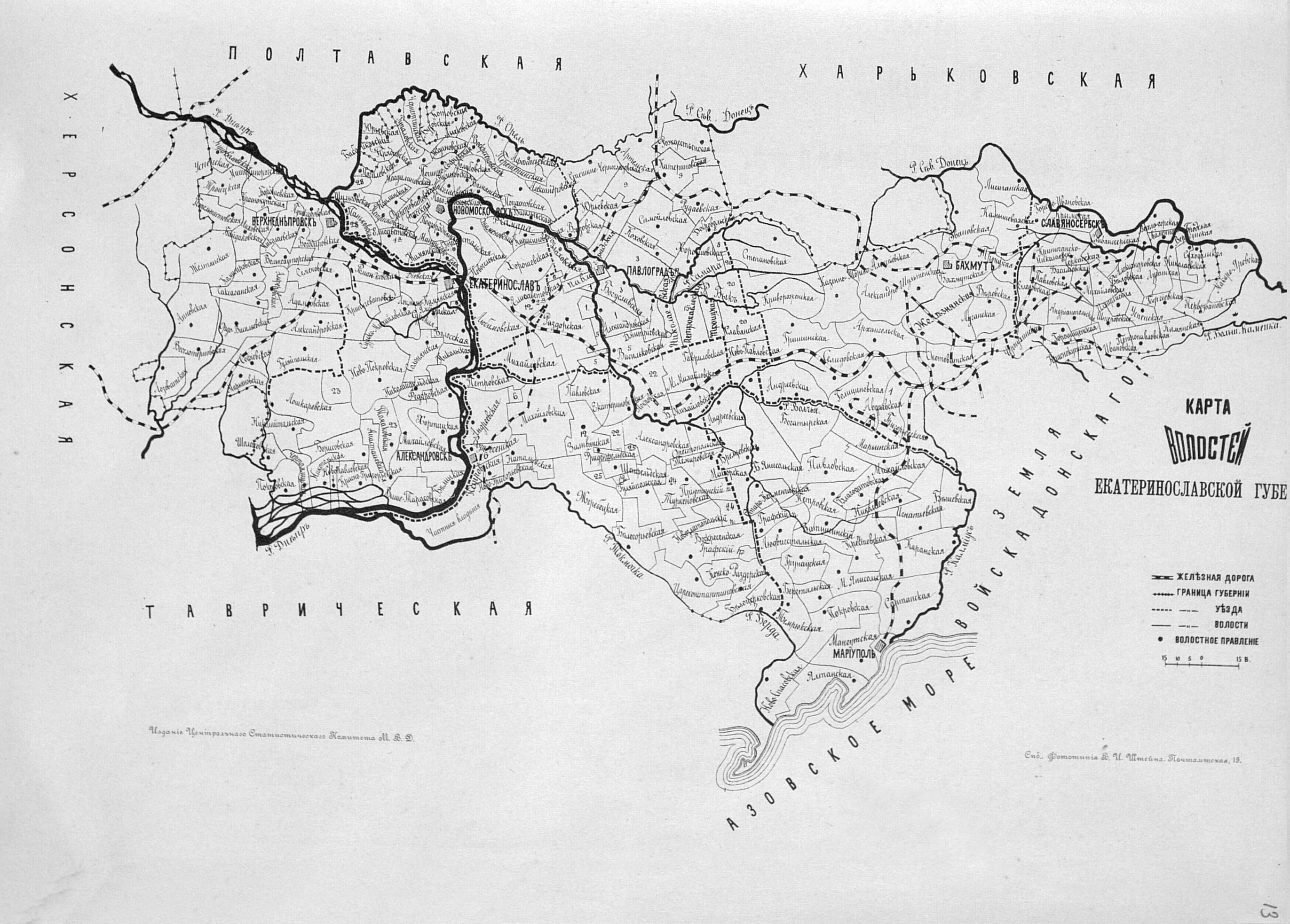 Карта волостей Екатеринославской губернии